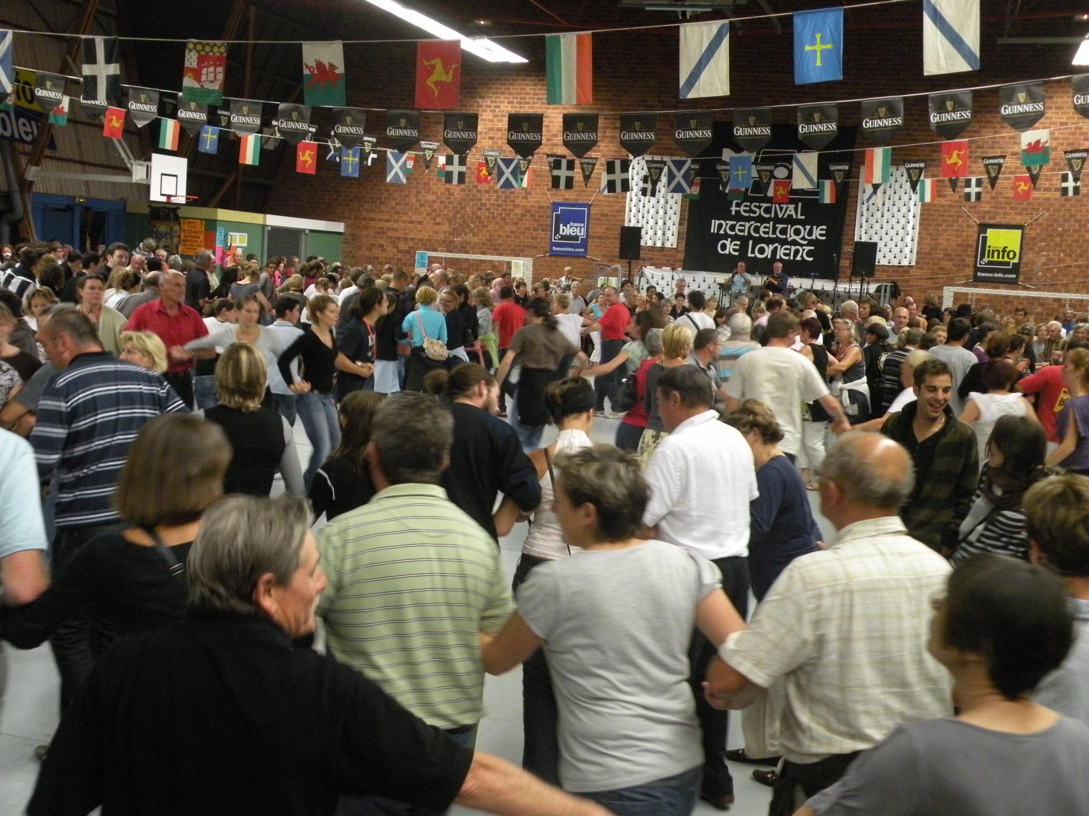 Fest-noz er sal Carnot, Emvod ar Gelted, An Oriant, 14 a viz Eost 2010.